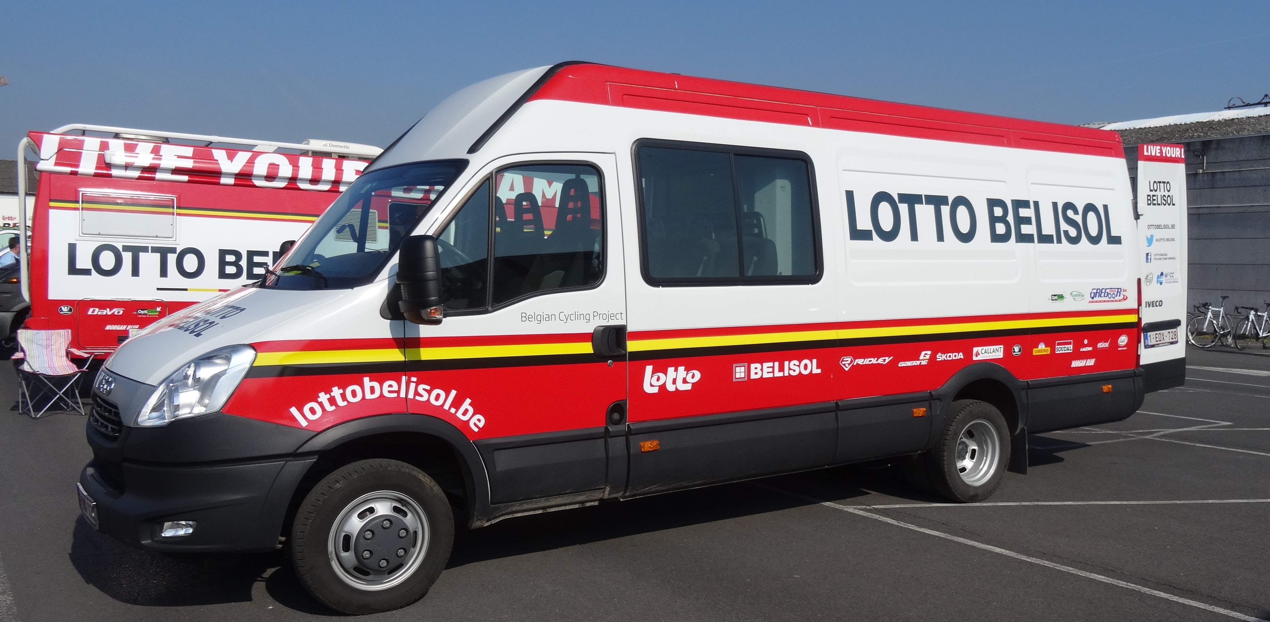 Reportage réalisé le samedi 17 mai à l'occasion du départ du Grand Prix Criquielion 2014 à Boussu, Belgique.